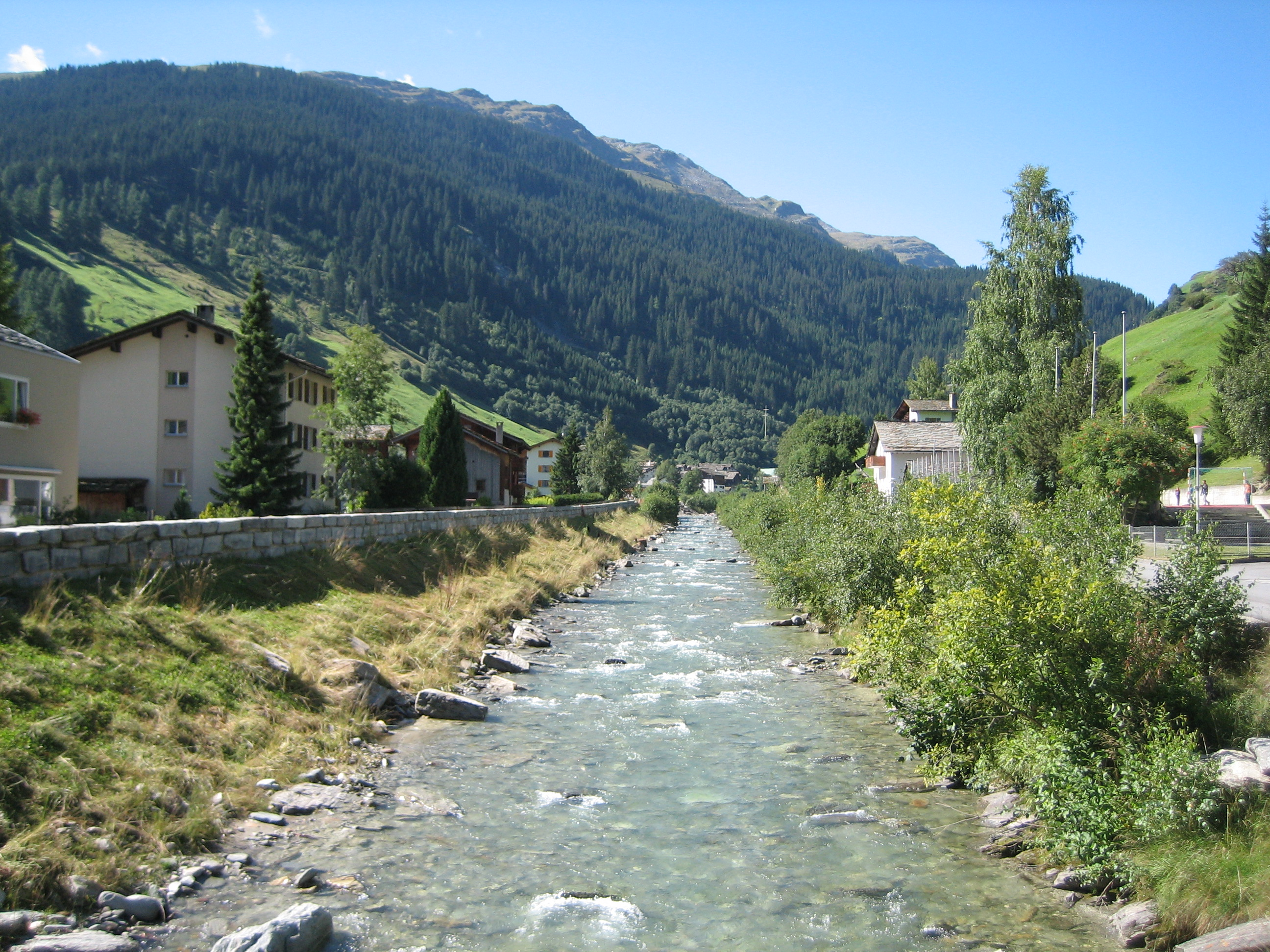 Valserrhein in Vals